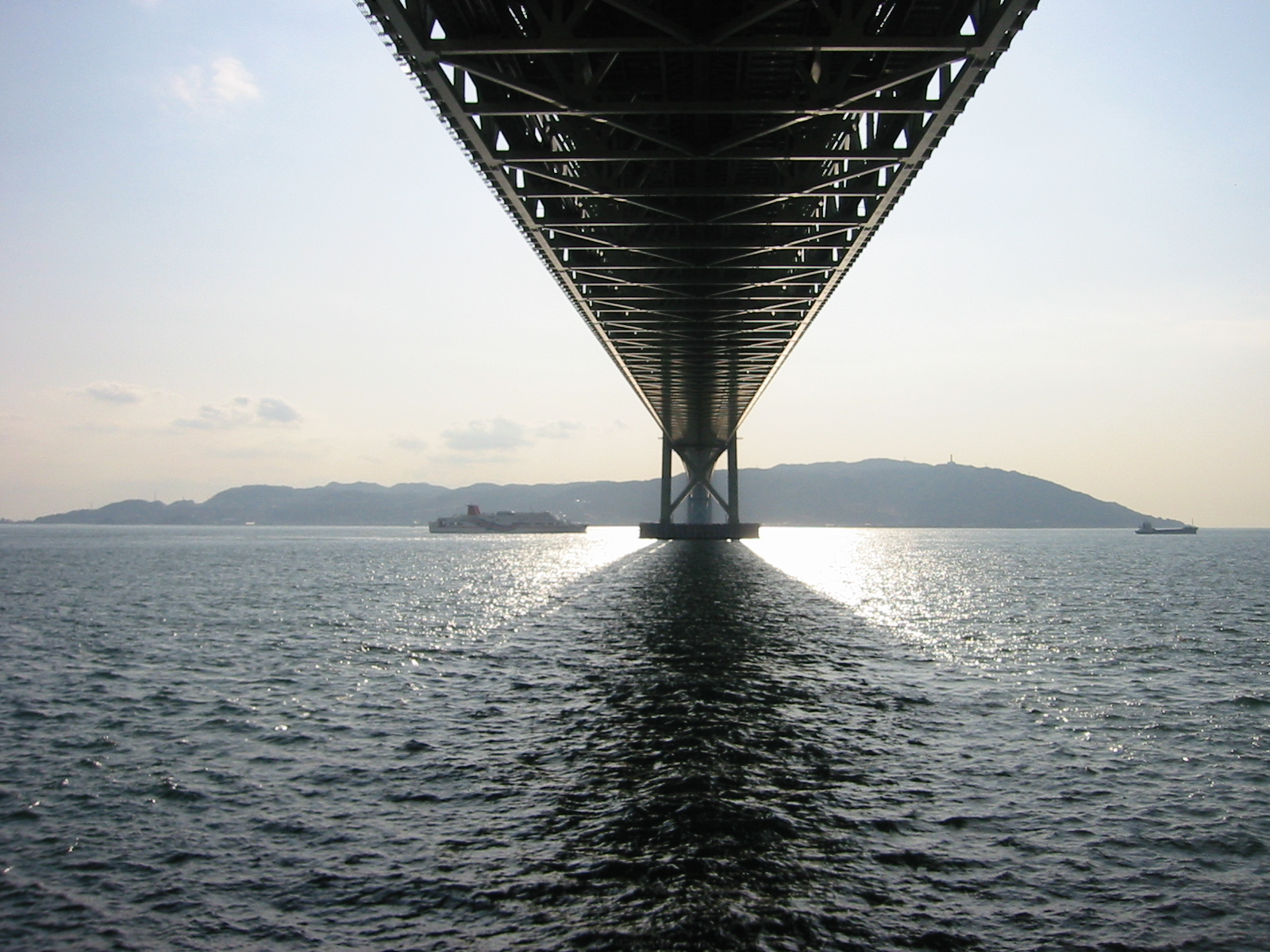 舞子公園 明石海峡大橋